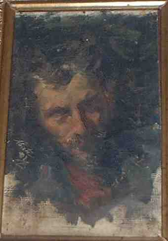 ritratto di F.P. Frontini,autore A. Abate, collezione Frontini